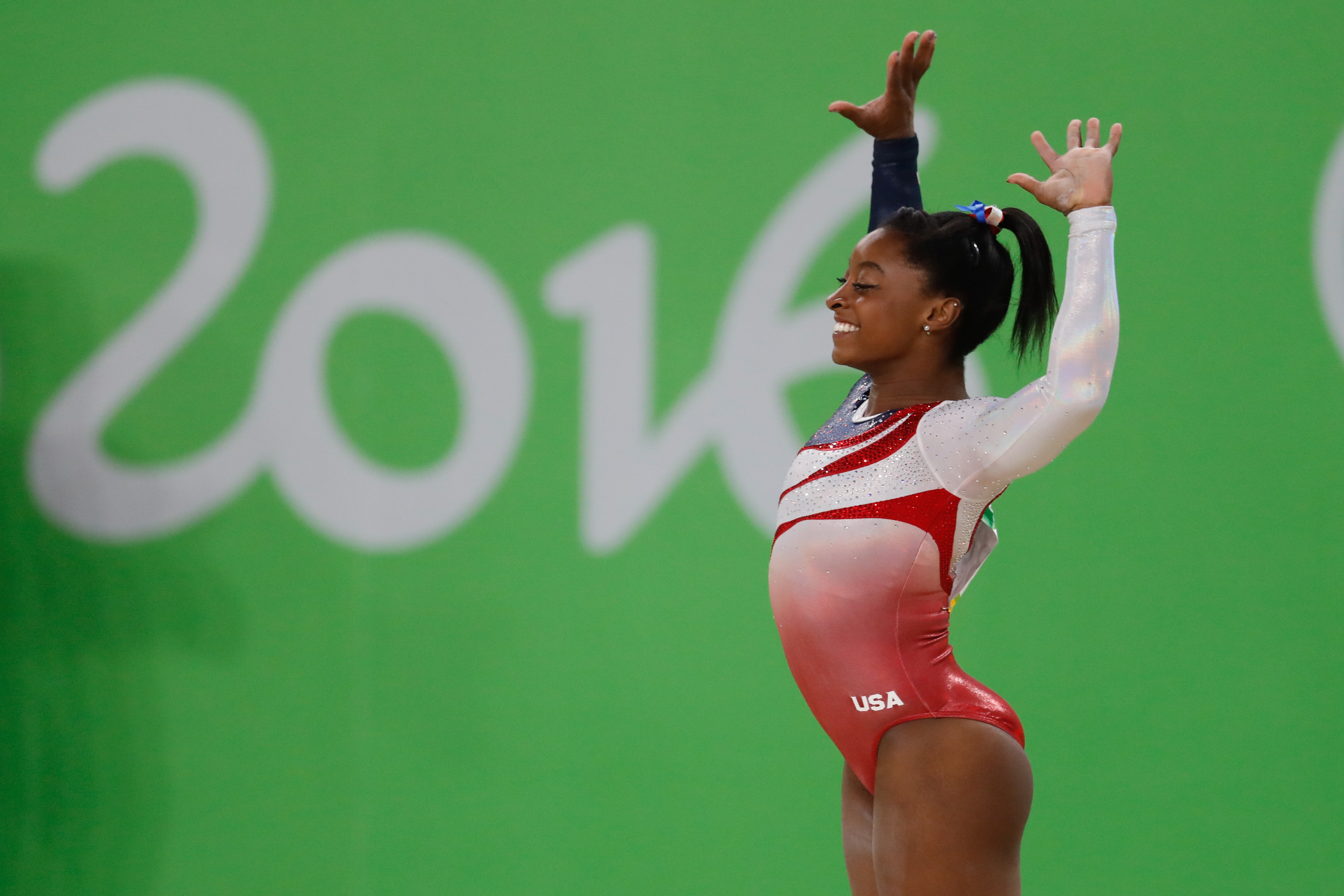 Rio de Janeiro - Simone Biles, ginasta dos Estados Unidos, durante final em que levou medalha de ouro na disputa por equipes feminina nos Jogos Olímpicos Rio 2016. (Fernando Frazão/Agência Brasil)